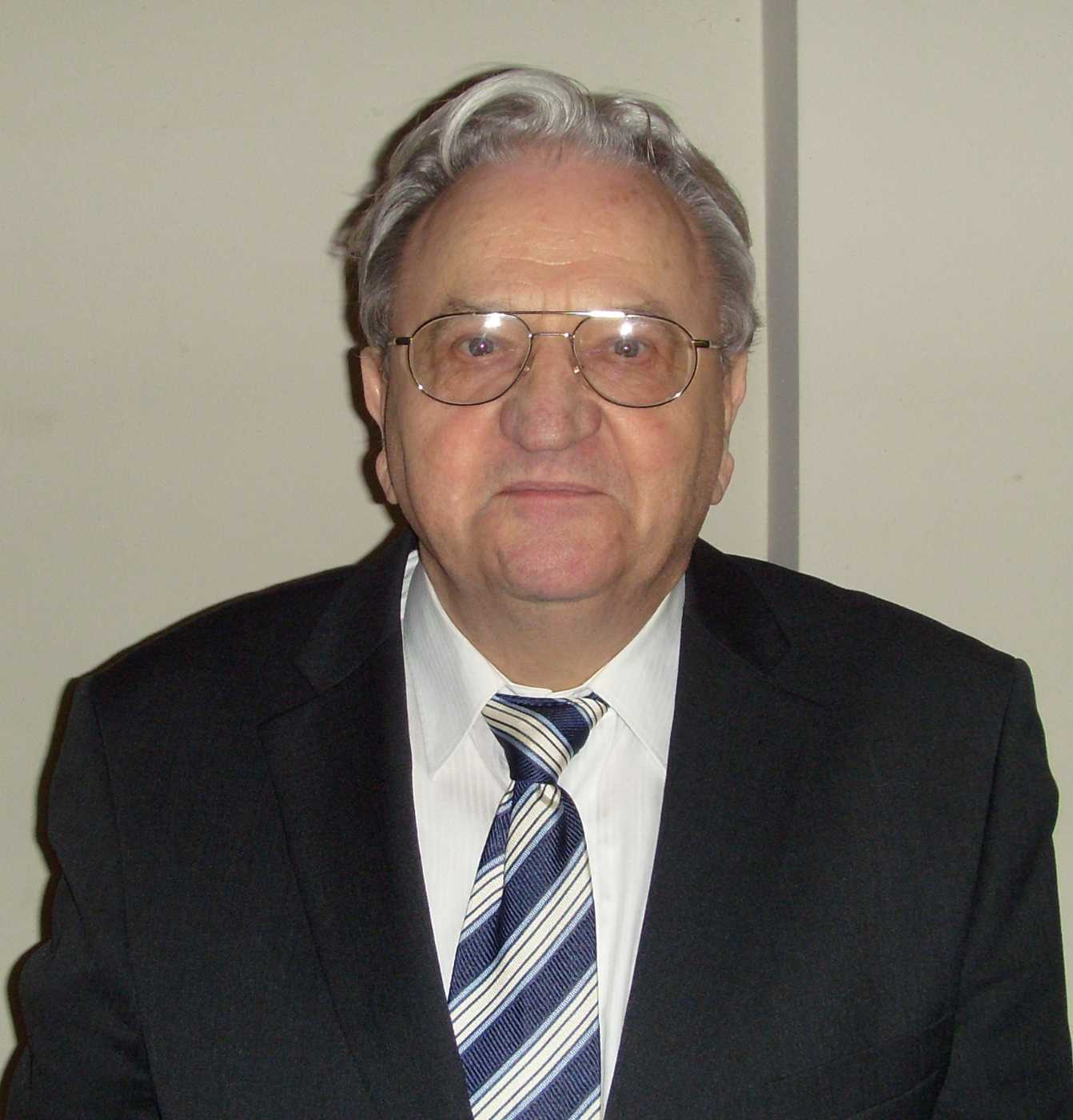 Prof. Dr. Ernst Schmutzer an seinem Festkolloquium am 3. März 2010